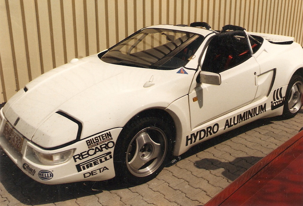 Treser TR1 (1987-1988), Motor VW, 1,8 Ltr. 16V, 150 PS, 1 of 25 build, Photo taken in 1988 at my home